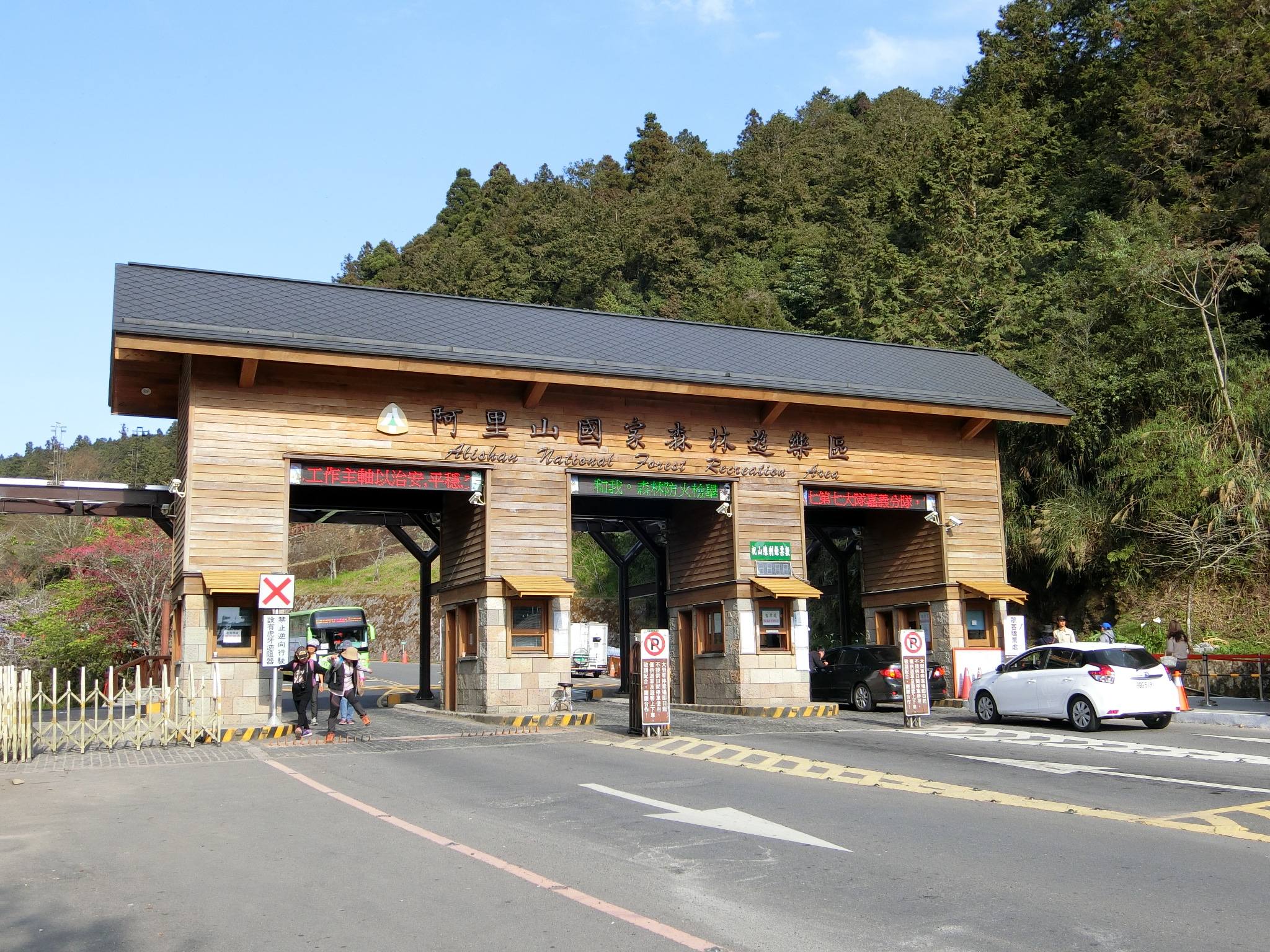 阿里山國家森林遊樂區大門。